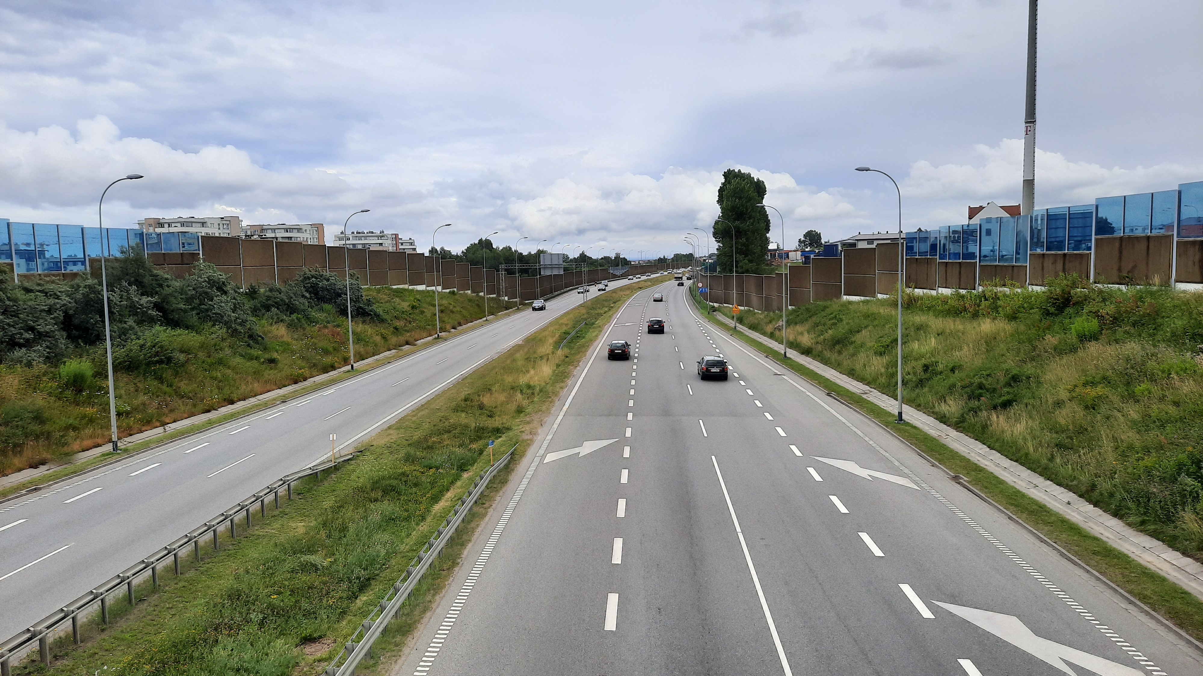 Trasa W-Z w Gdańsku, widok z Węzła Karczemki w kierunku Jasienia